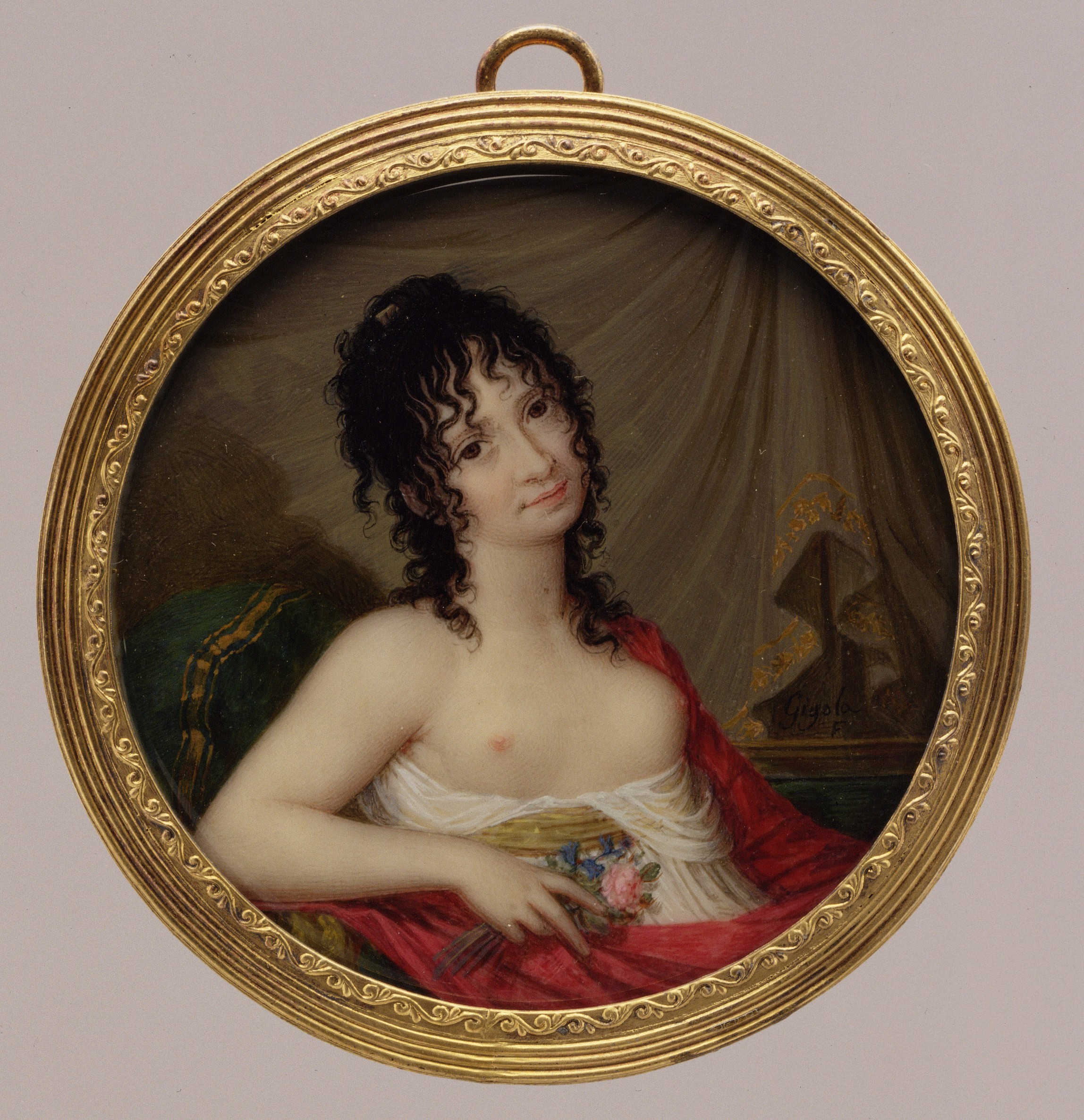 Painting, miniature; Miniatures